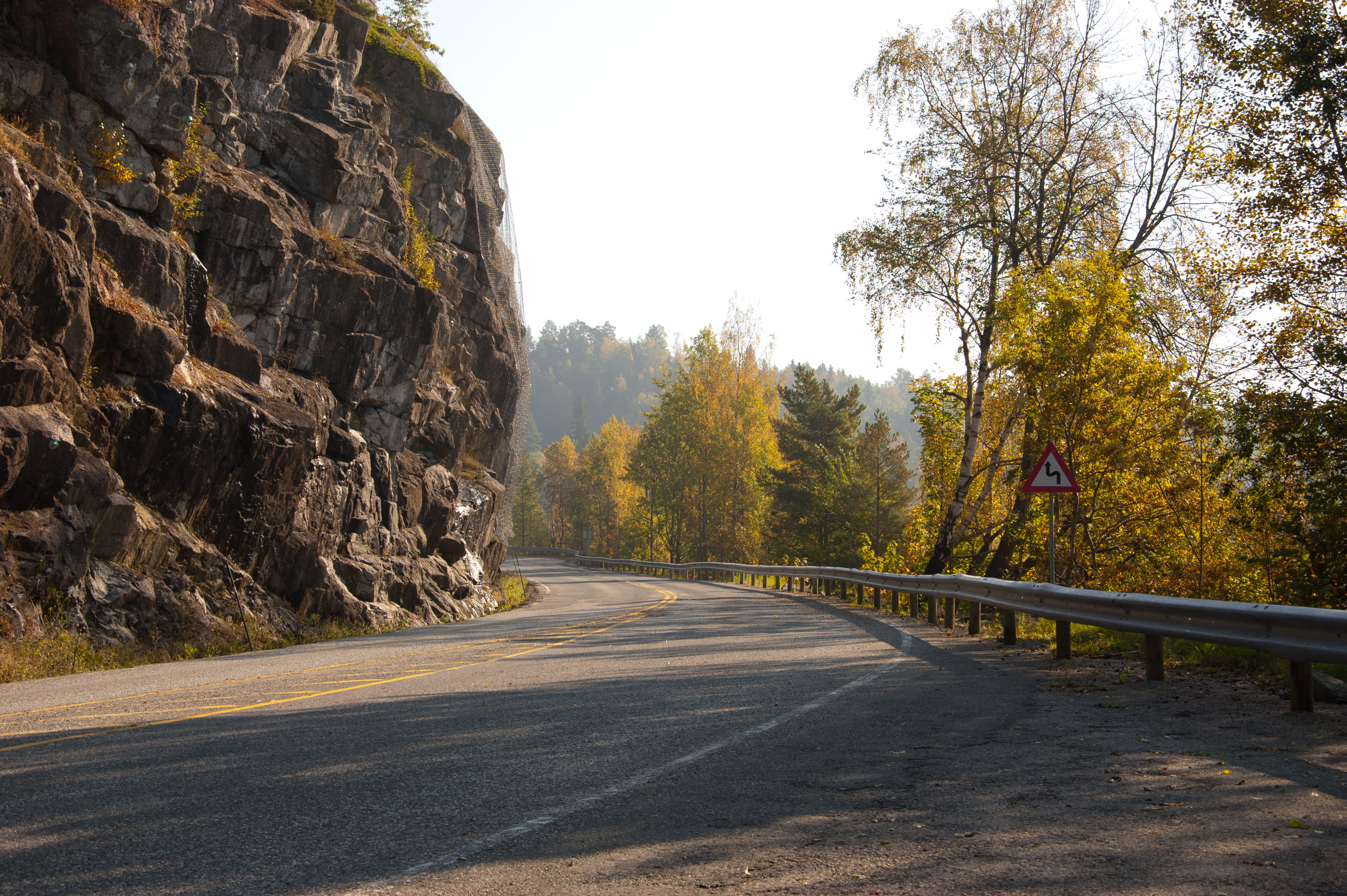 Fylkesvei 30 Langangsvegen i Porsgrunn, Telemark